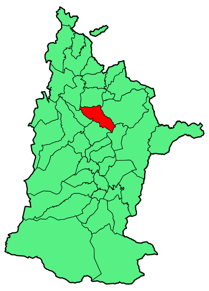 Mauleren kokapena zuberoan